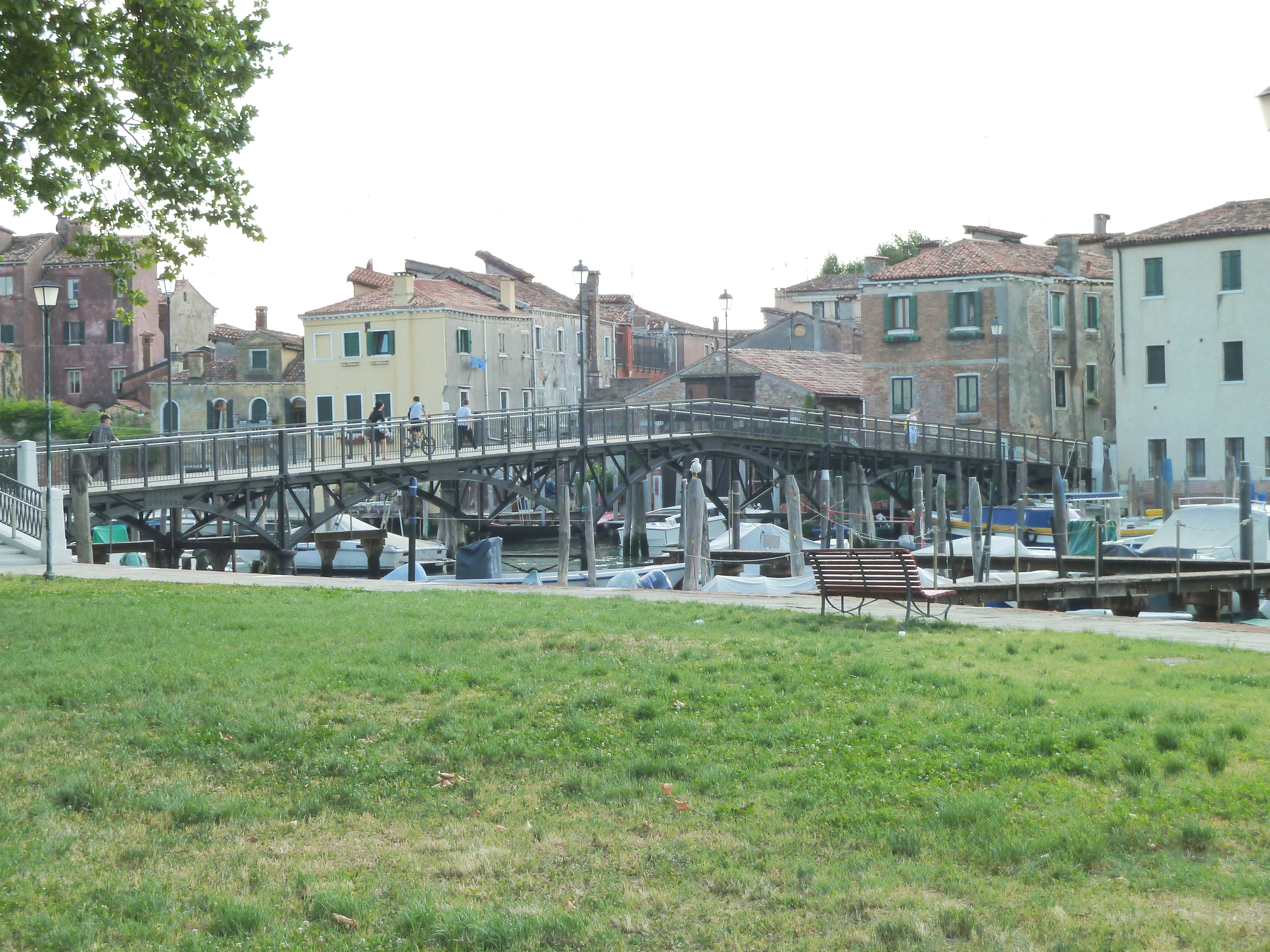 Ponte di San Pietro (Venice)